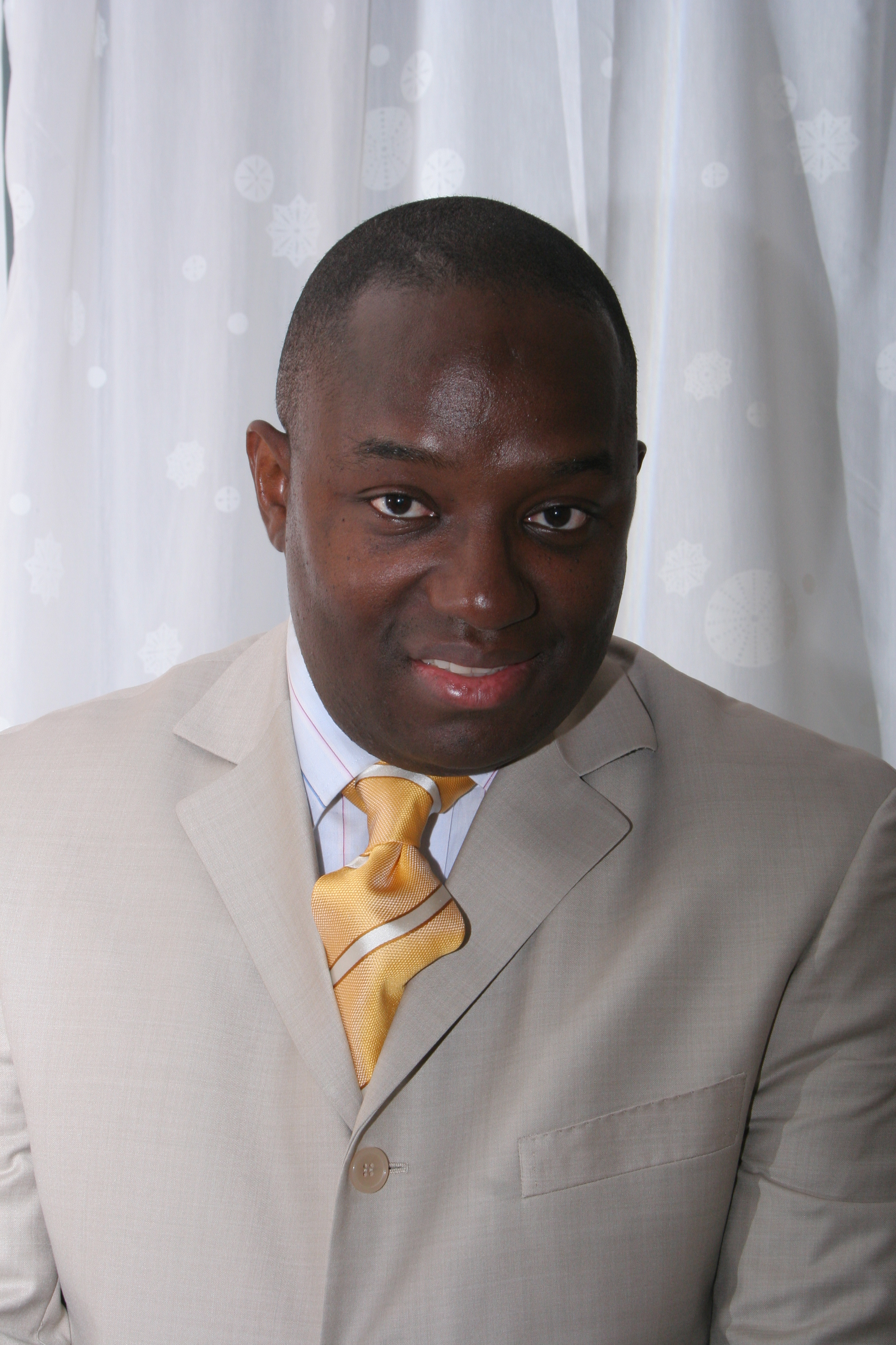 Martial Ahipeaud